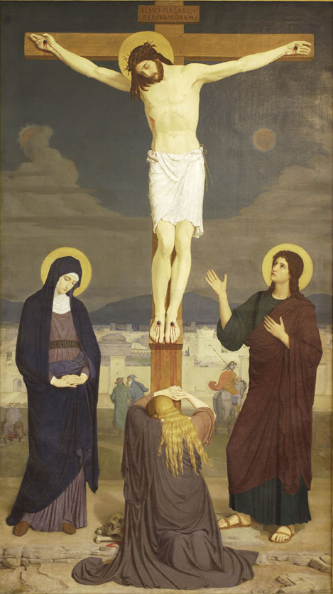 Entstanden 1868 in Rom für Kardinal von Mecheln, von Abt Maurus Wolter für Beuron erworben, dort bis in die 1960er Jahre in der Klosterkirche, jetzt im Konvent